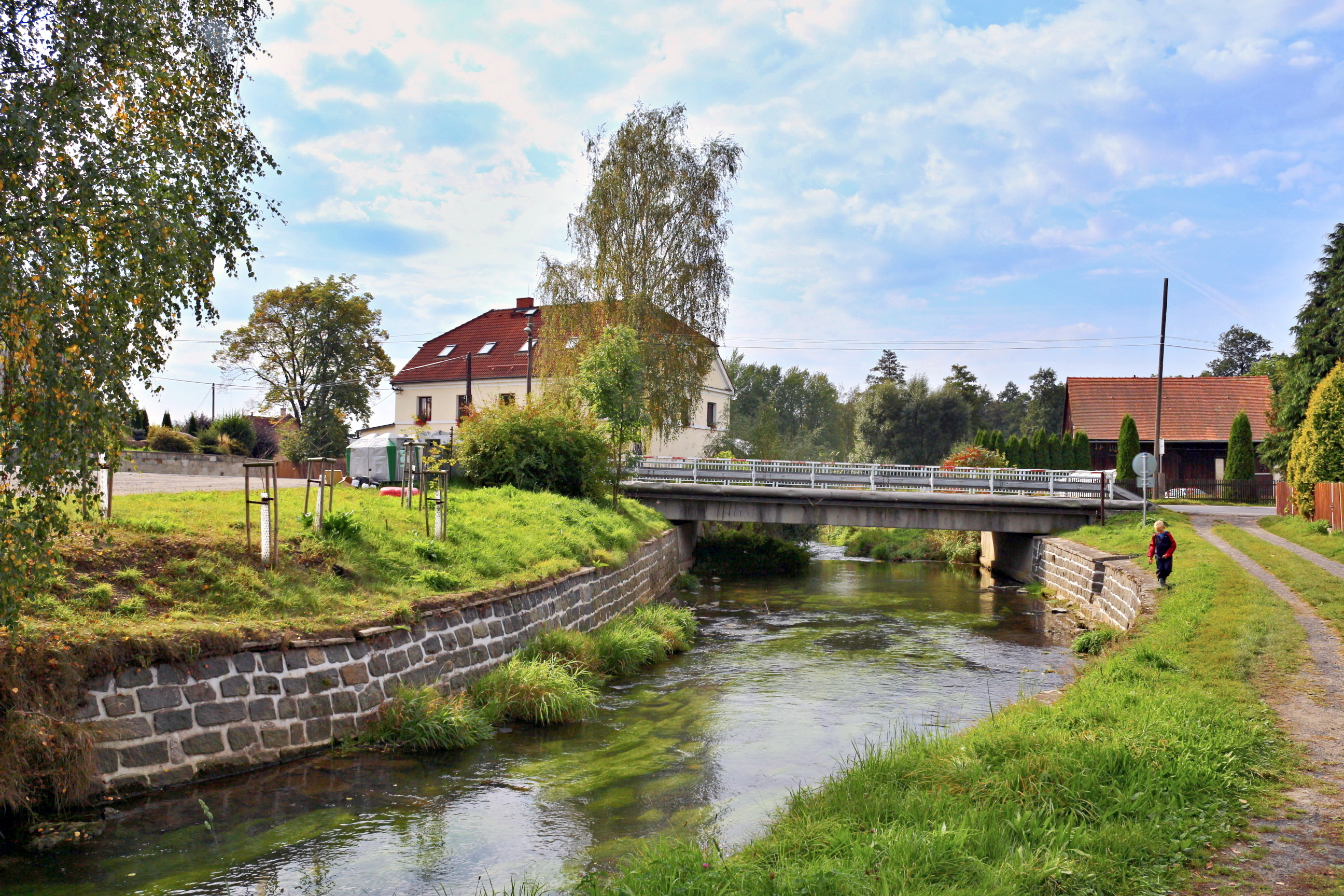 Brniště